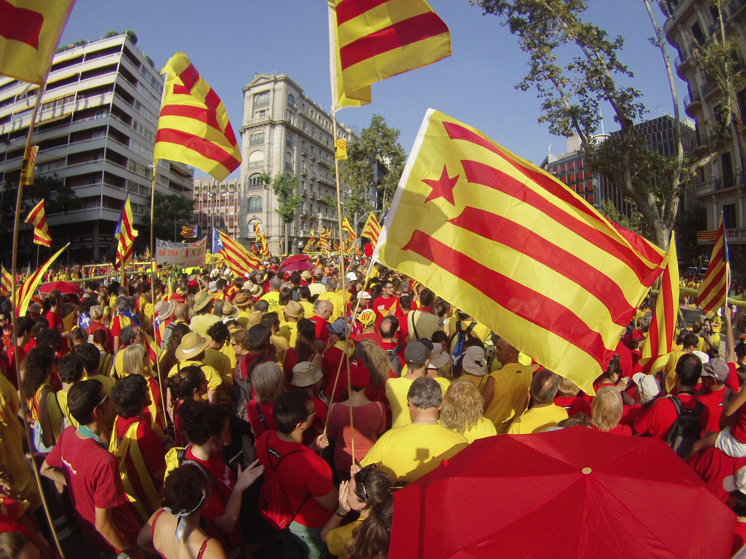 Foto des del tram 15.